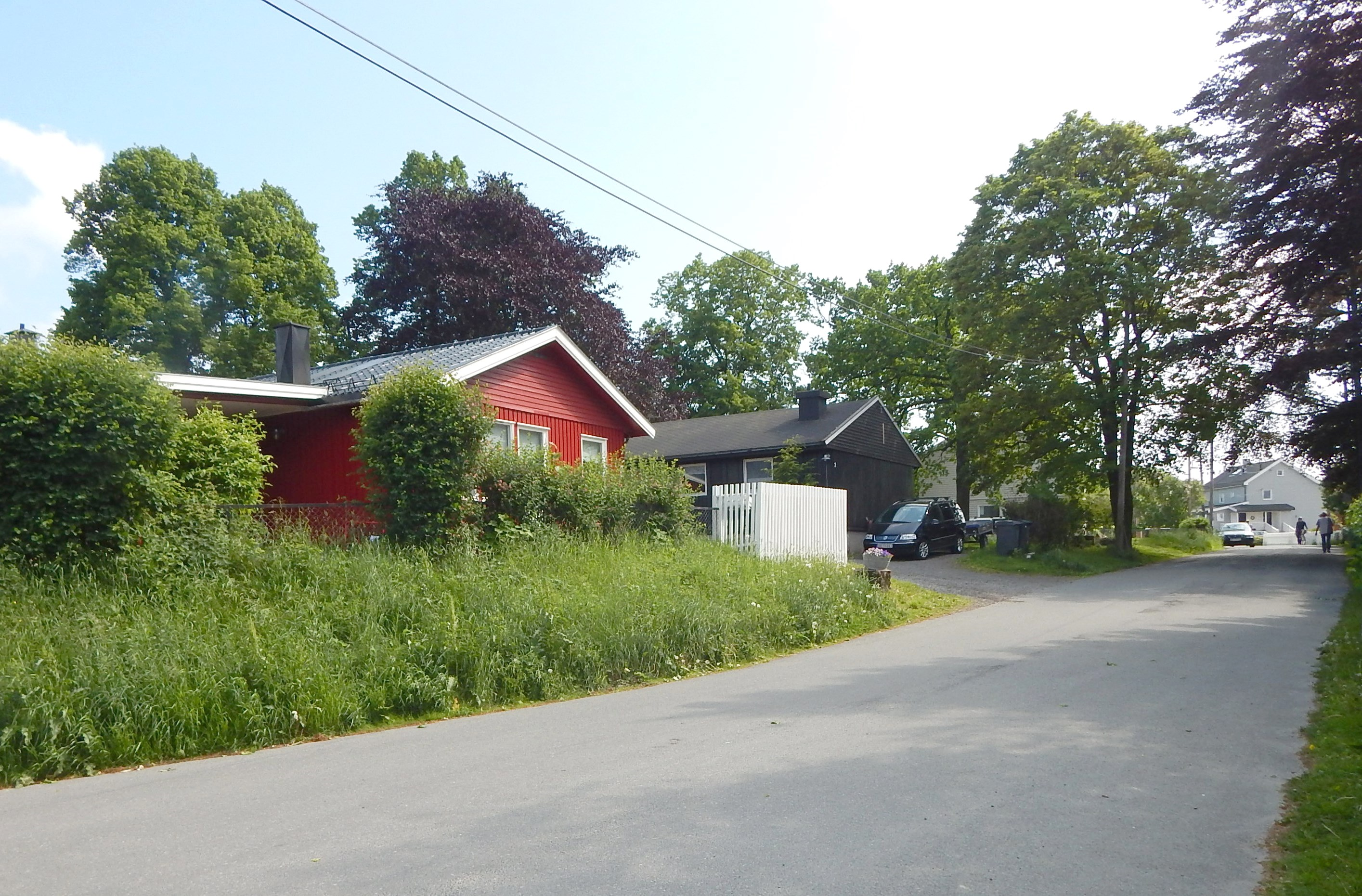 Gartnerveien sett fra Kildals vei